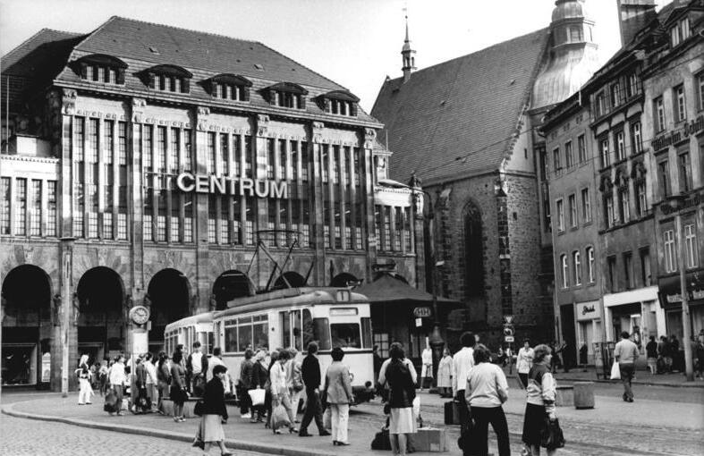 Görlitz, Demianplatz, "Centrum"-Warenhaus, Frauenkirche ADN-ZB Hiekel 31.10.1986 Bez. Dresden: Warenhaus Görlitz - Das Centrum-Warenhaus, am Demianplatz in unmittelbarer Nähe der Frauenkirche gelegen, wurde in den vergangenen Jahren originalgetreu restauriert. Das Gebäude wurde 1912-13 vom Architekten Schmanns aus Potsdam errichtet. - siehe dazu auch das Foto 1986-1031-016